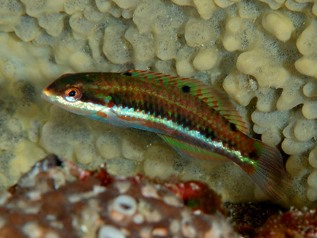 ヤンセンニシキベラ Thalassoma jansenii